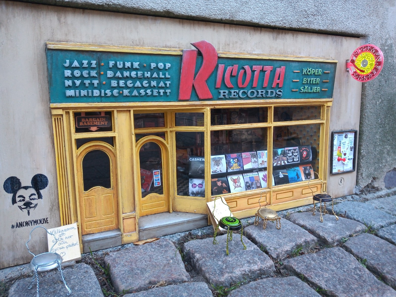 Skivaffären Ricotta Records för möss, gjord av Anonymouse. Finns på Nygatan i Lund (Parkskolan)